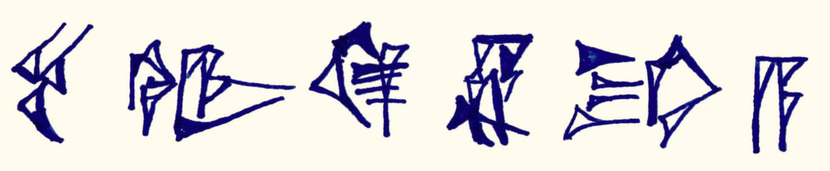 Mia riproduzione, adattata, della fedele riproduzione della linea 2 della tavola inerente all'opera in lingua sumerica conosciuta come Enki e Ninḫursaĝa operata da Samuel Noah Kramer (cfr. qui: Traduzione it: La terra di Dilmun è pura. Traduzione en: The land Dilmun is holy.